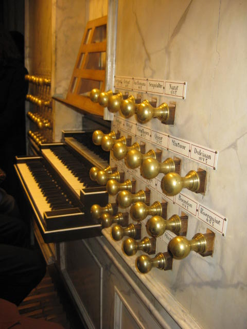 Orgel in de Nieuwe Kerk te Amsterdam